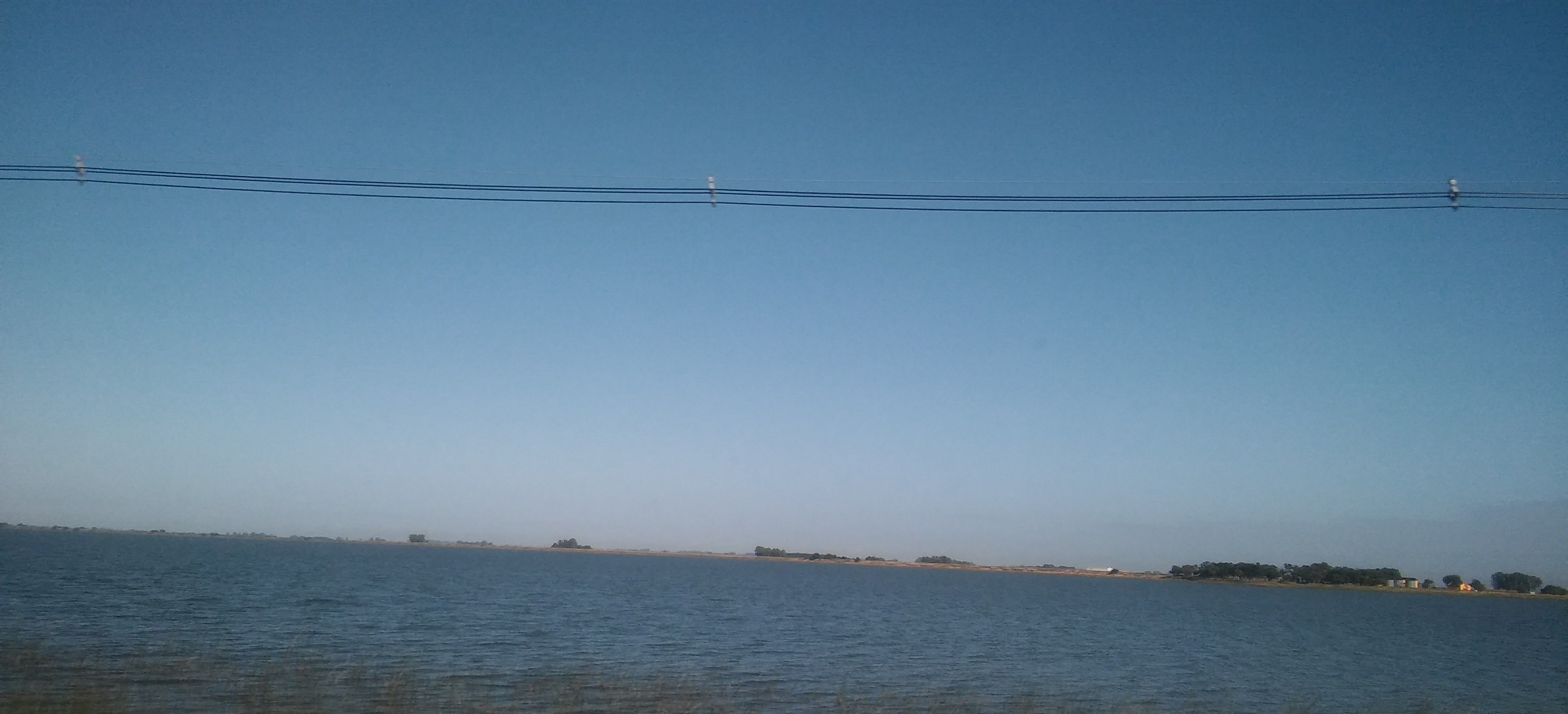 Vista de la Laguna Chis Chis (ubicada en el Partido de Chascomús, Provincia de Buenos Aires, Argentina) desde la Ruta Provincial 2.